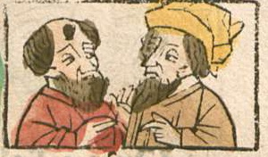 Pfister-Nativité-Ésaie et Michée